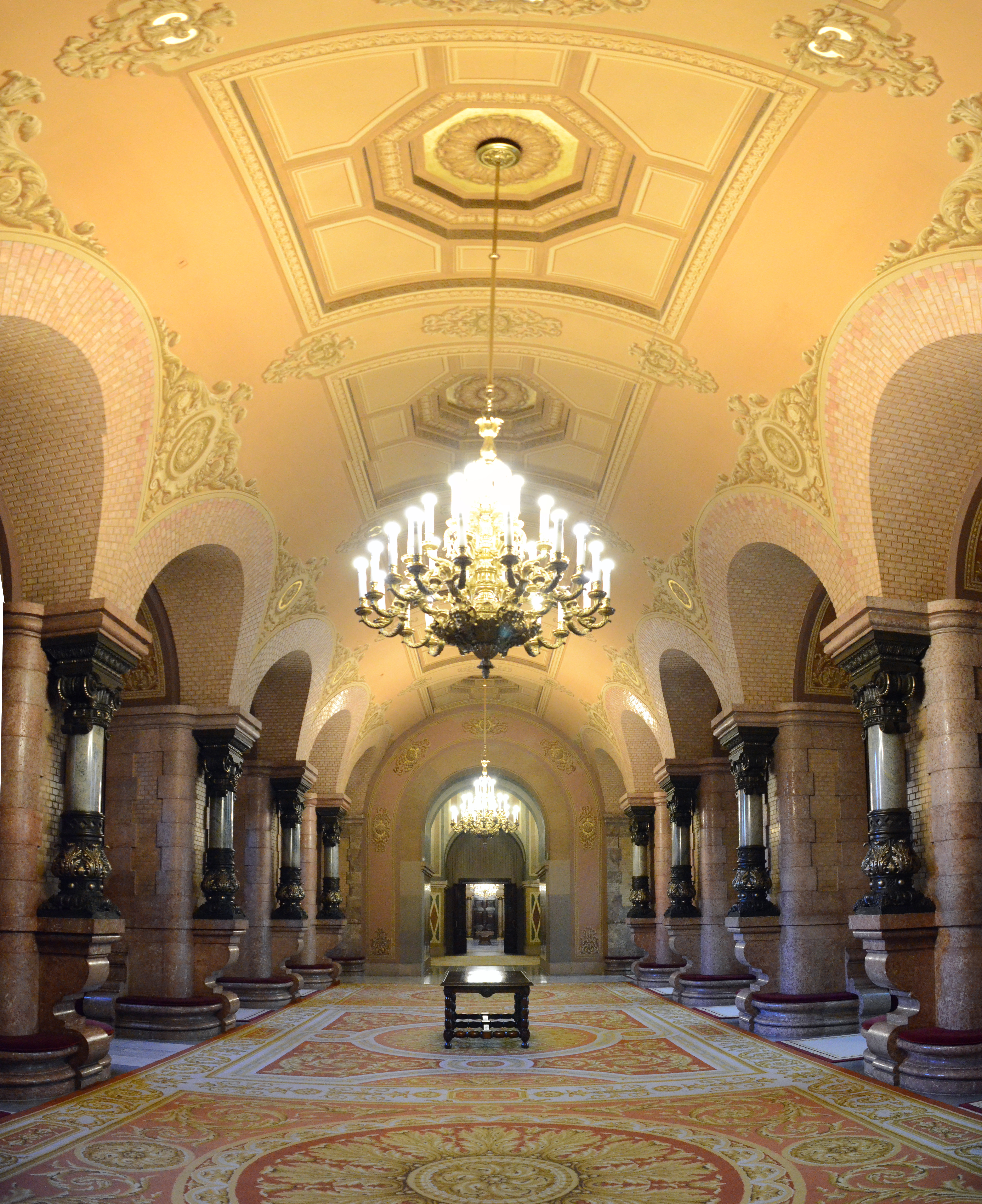 Salón rosa